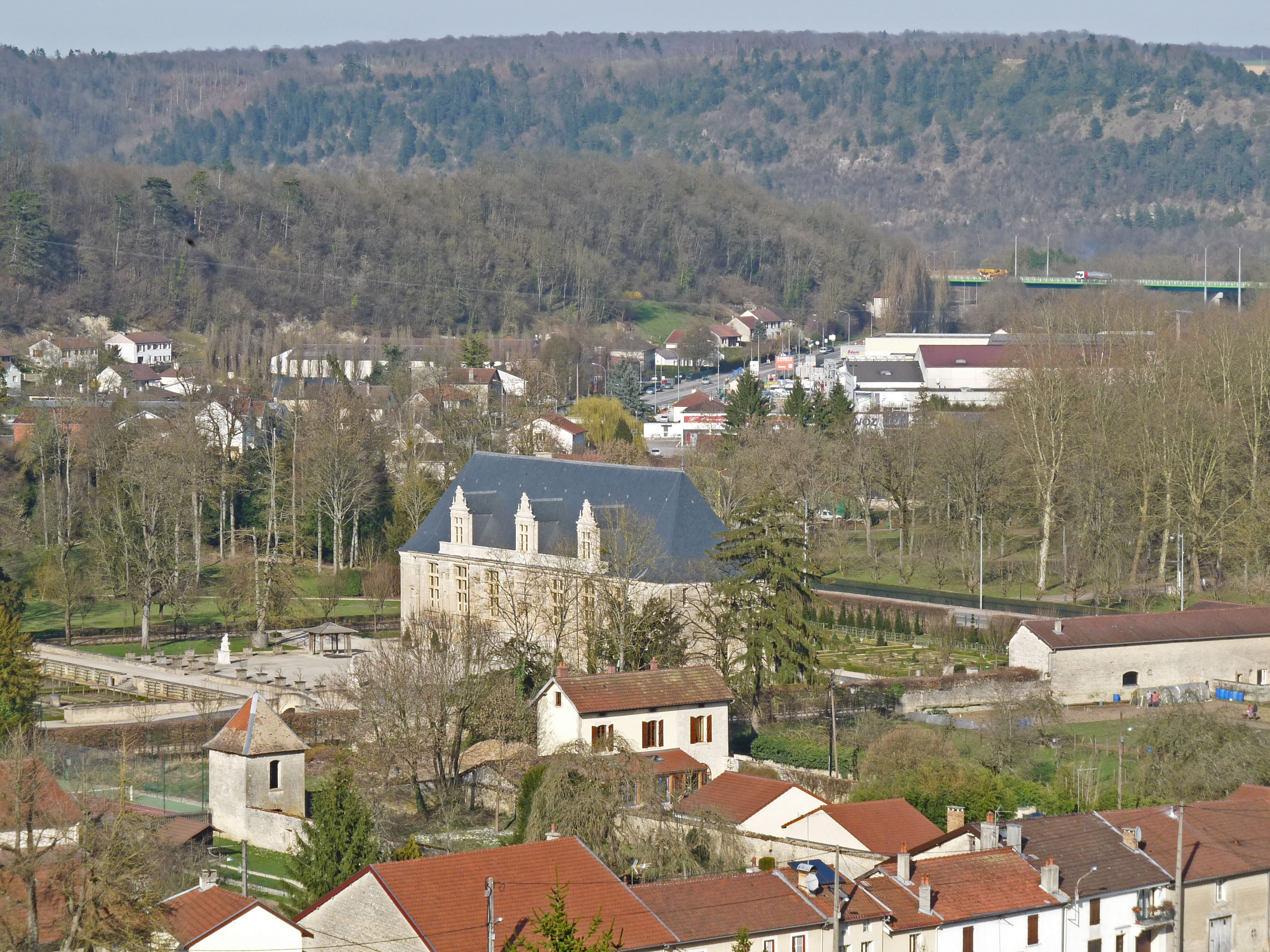 Vue sur le Château du Grand Jardin à Joinville (Haute-Marne), depuis le site de l'ancien château